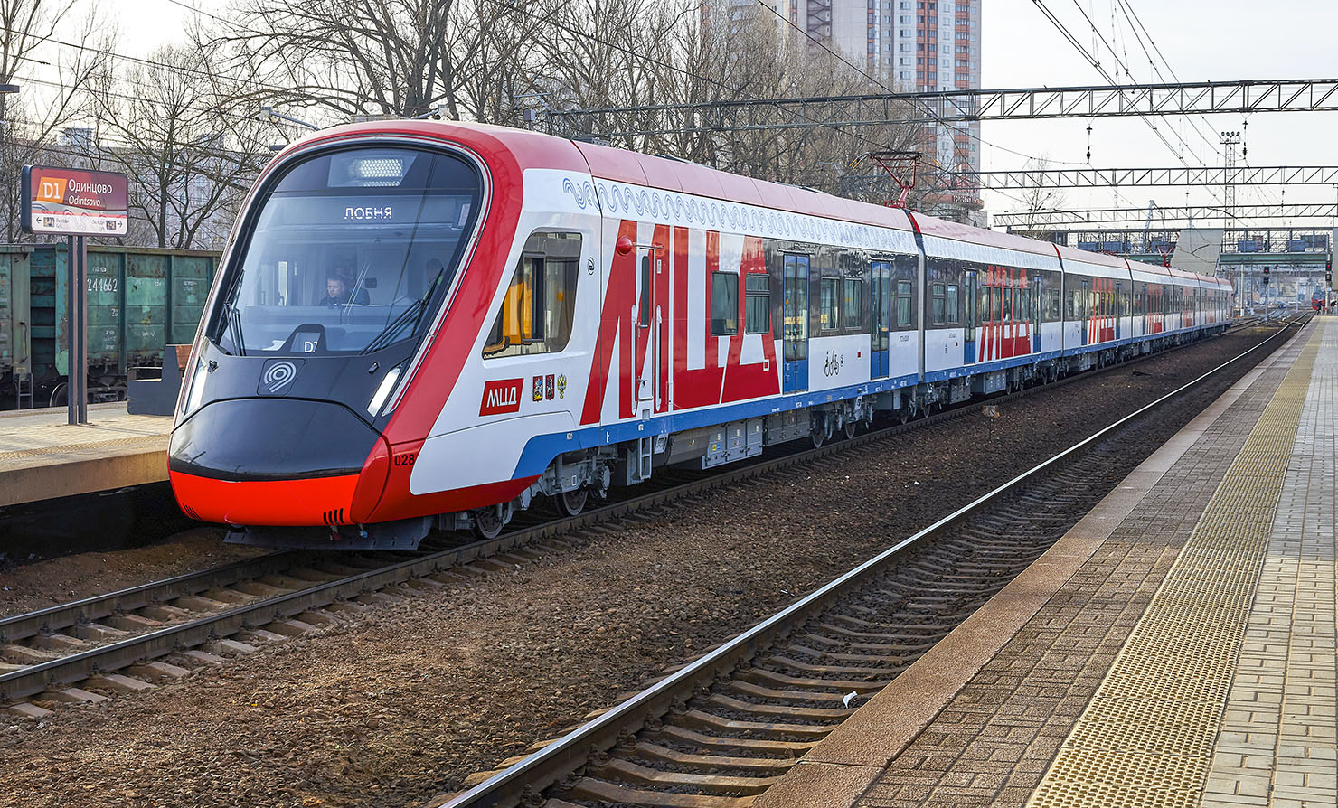 Электропоезд ЭГ2Тв-028 на станции Одинцово